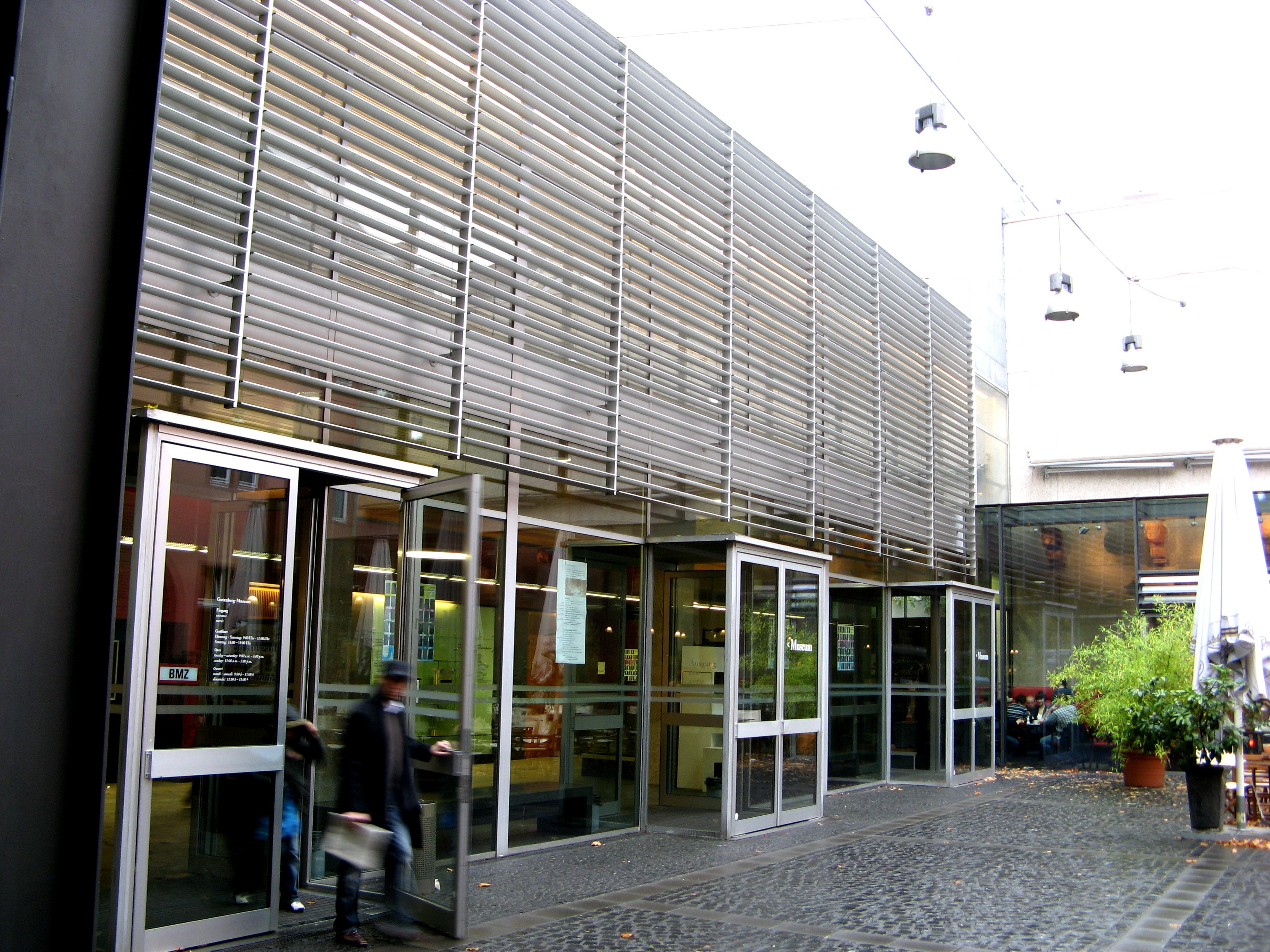 Gutenbergmuseum in Mainz, Schellbau